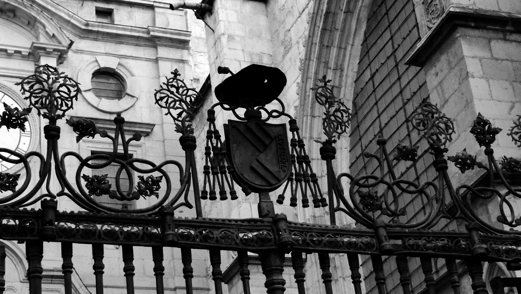 Reja del siglo XIV en la Puerta del Reloj de la Catedral Primada Toledo, España.